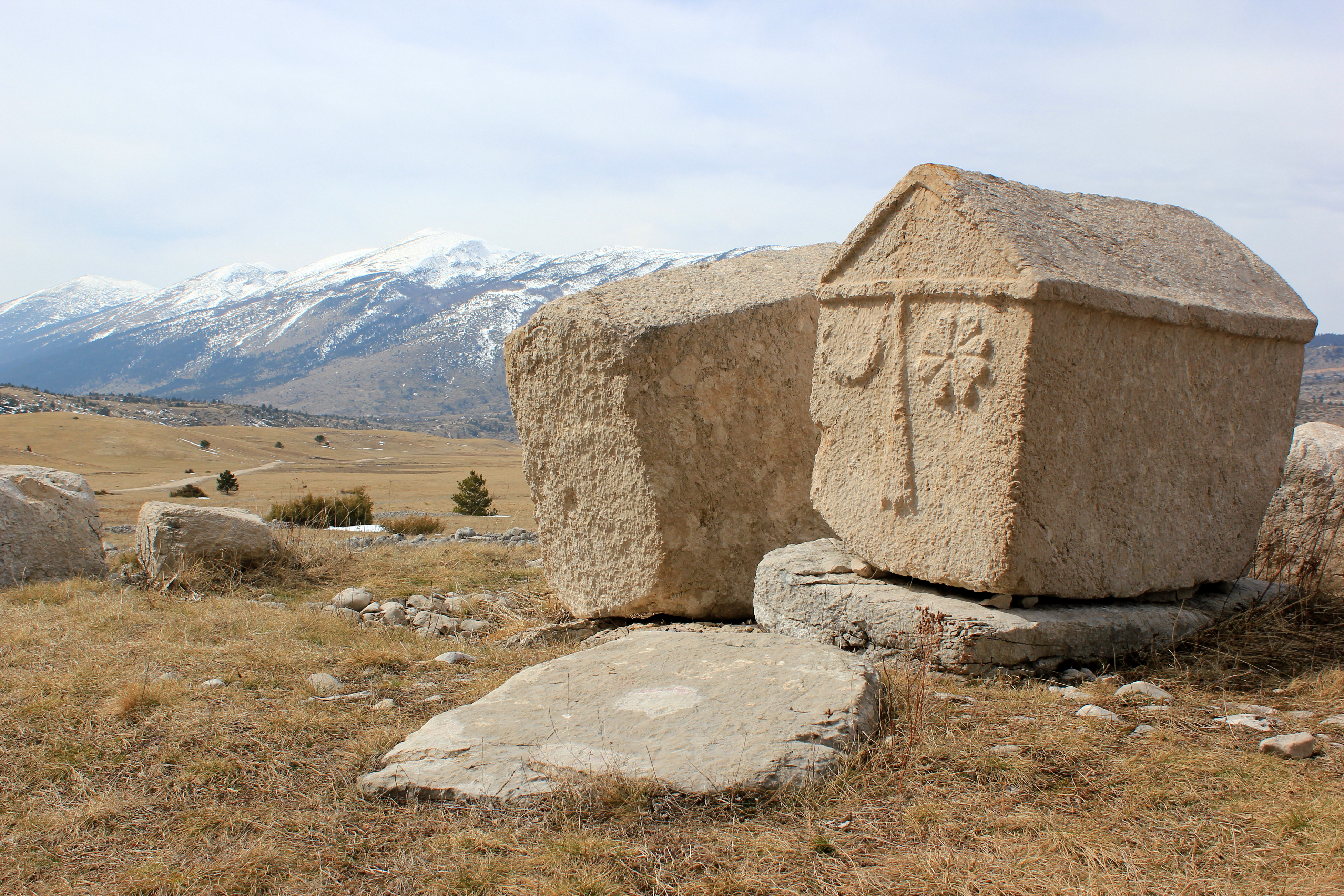 Stećci im Blidinjsko polje, im Hintergrund das Gebirge Vran, Bosnien und Herzegowina.